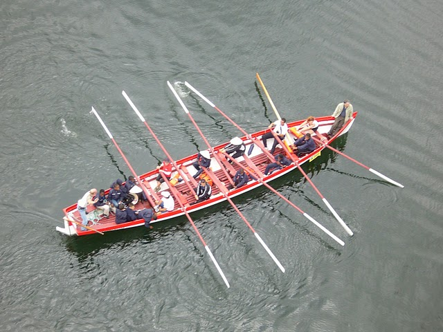 Brest : la yole Fraternité sous le Pont de Recouvrance lors de "Brest 2008"